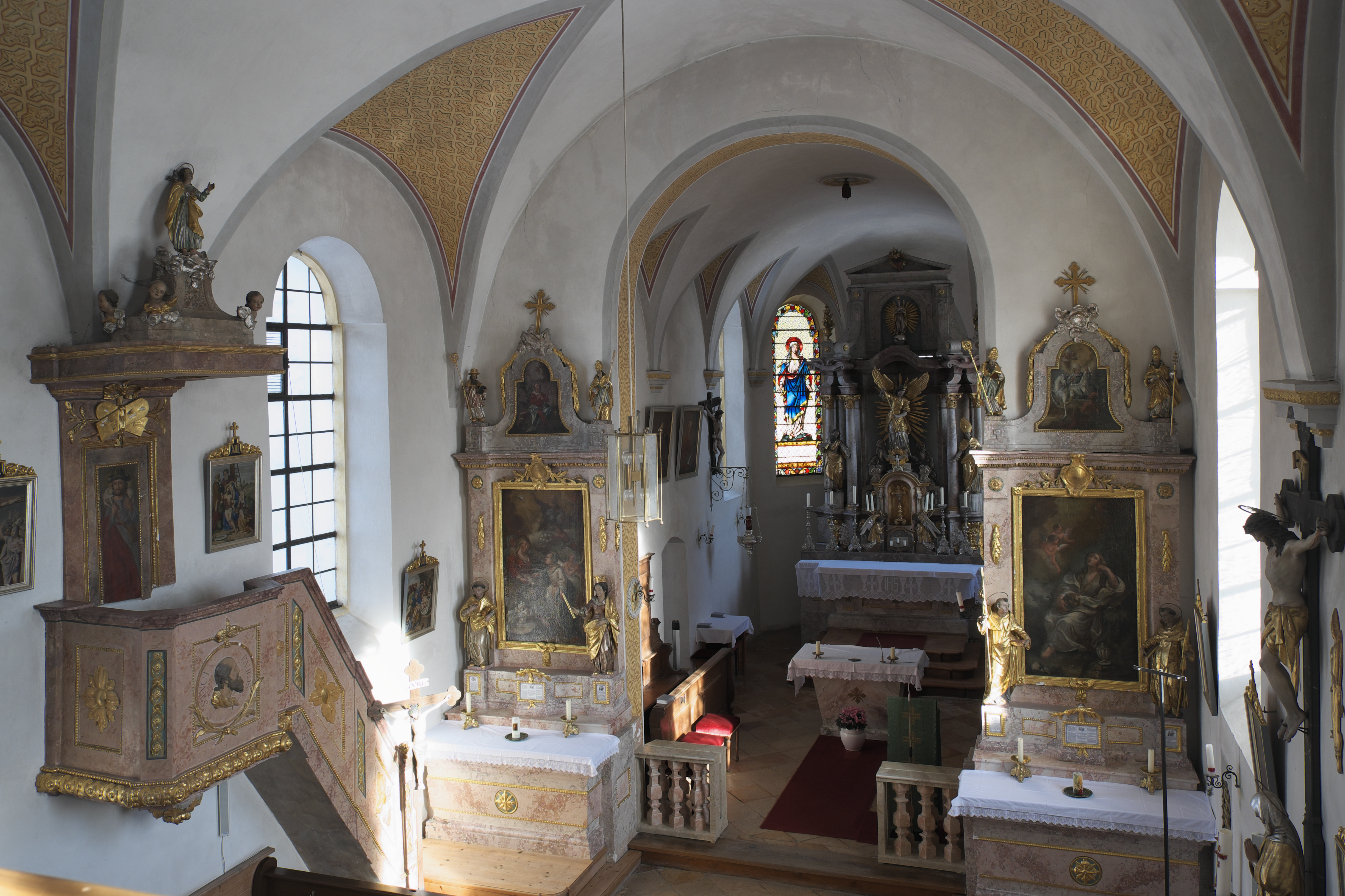 Katholische Pfarrkirche St. Michael in Marnbach (Weilheim in Oberbayern) im Landkreis Weilheim-Schongau (Bayern/Deutschland), Innenraum